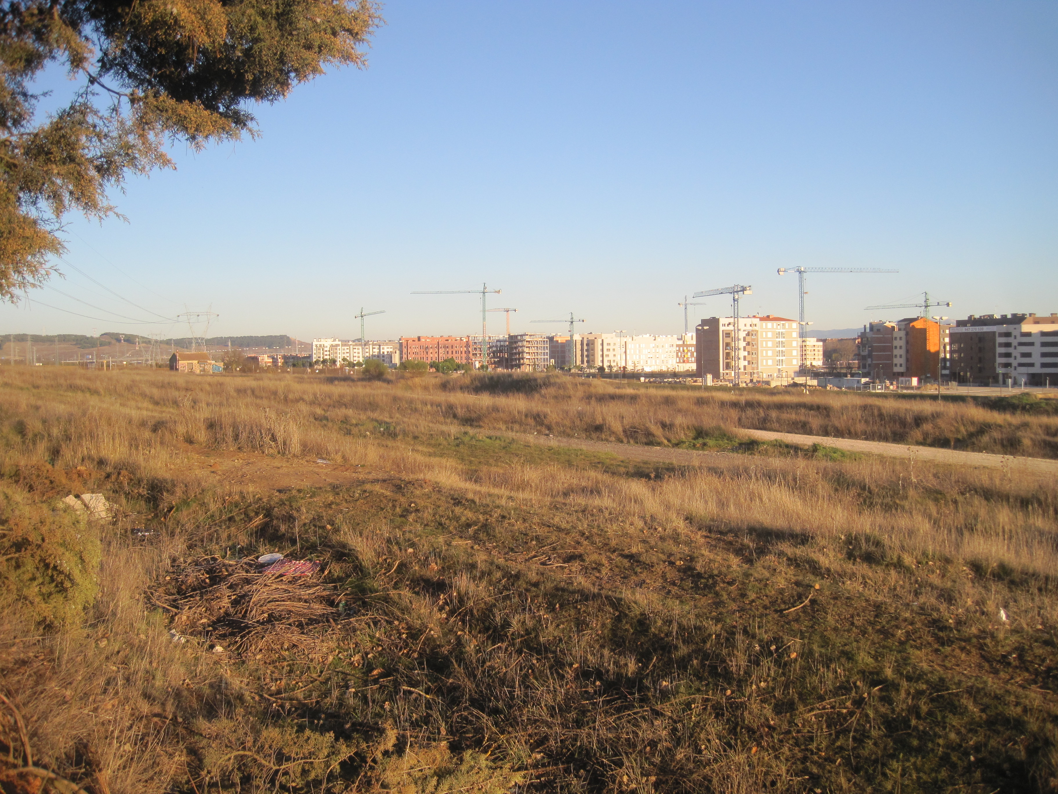 Resto de la calzada romana que unía Italia con Hispania a su paso por Burgos capital.